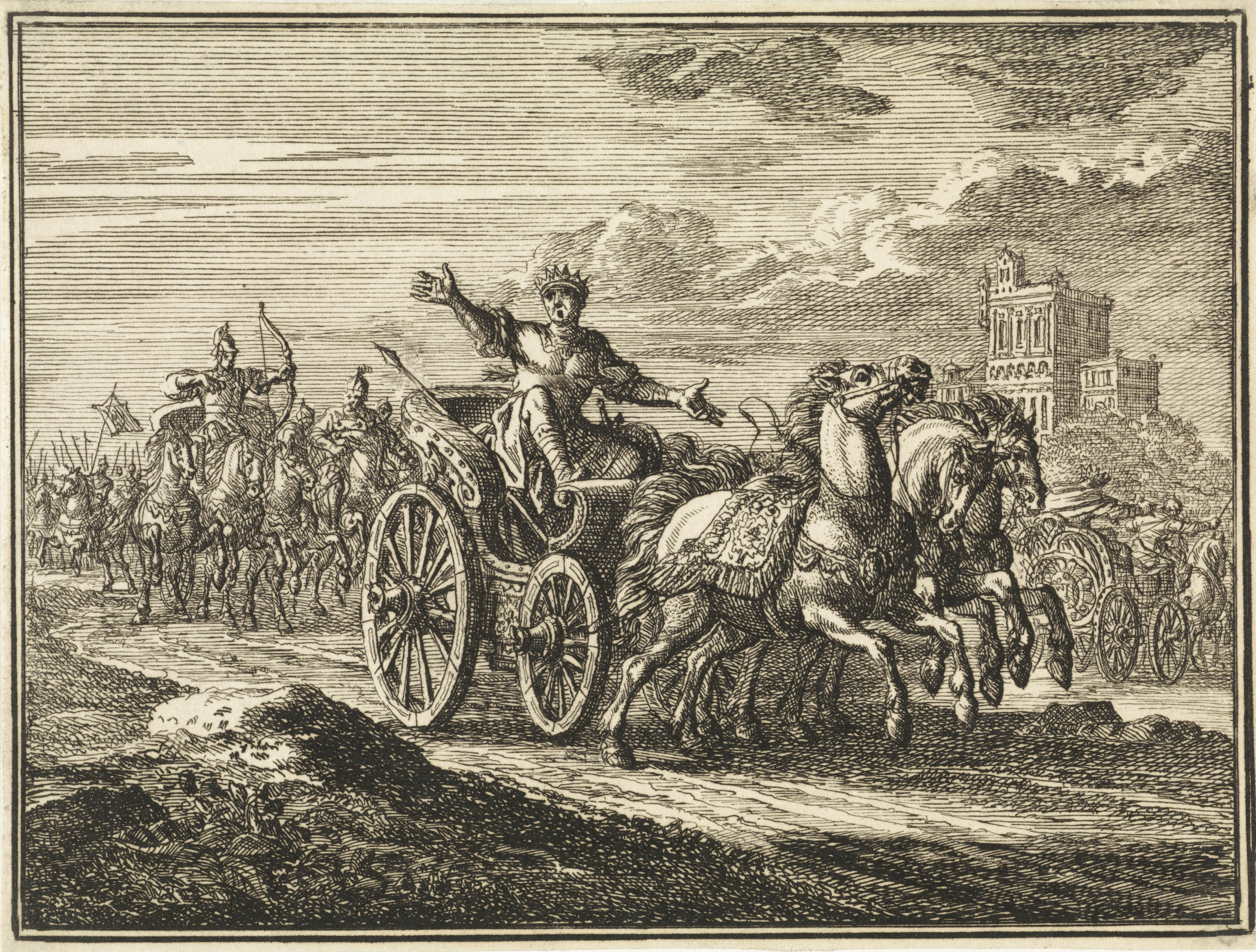 IdentificatieTitel(s): Joram op zijn wagen wordt door Jehu doorschotenObjecttype: prent Objectnummer: RP-P-OB-45.903Catalogusreferentie: Van Eeghen 4199Opschriften / Merken: verzamelaarsmerk, verso, gestempeld: Lugt 2228nummer, verso, handschrift in bruine inkt: ‘149’VervaardigingVervaardiger: prentmaker: Jan LuykenPlaats vervaardiging: AmsterdamDatering: 1712Fysieke kenmerken: ets; proefdrukMateriaal: papier Techniek: etsenAfmetingen: blad: h 113 mm × b 149 mmToelichtingIllustratie uit: Luyken, Jan. De schriftuurlyke geschiedenissen en gelykenissen van het Oude en Nieuwe Verbond, 2 delen. Amsterdam: Wed. Pieter Arentsz II en Cornelis van der Sys, 1712, dl. I.OnderwerpWat: when Jehoram realizes Jehu's treason, he turns his chariot round to flee, but Jehu shoots an arrow that strikes Jehoram in the back; the king falls dead in his chariotVerwerving en rechtenVerwerving: onbekendCopyright: Publiek domein